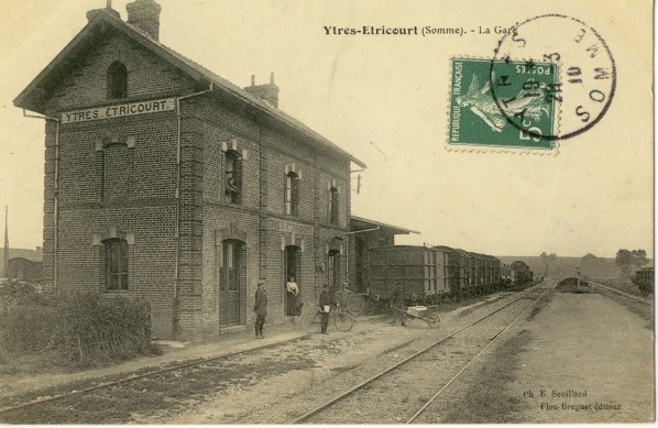 La gare vers 1910.